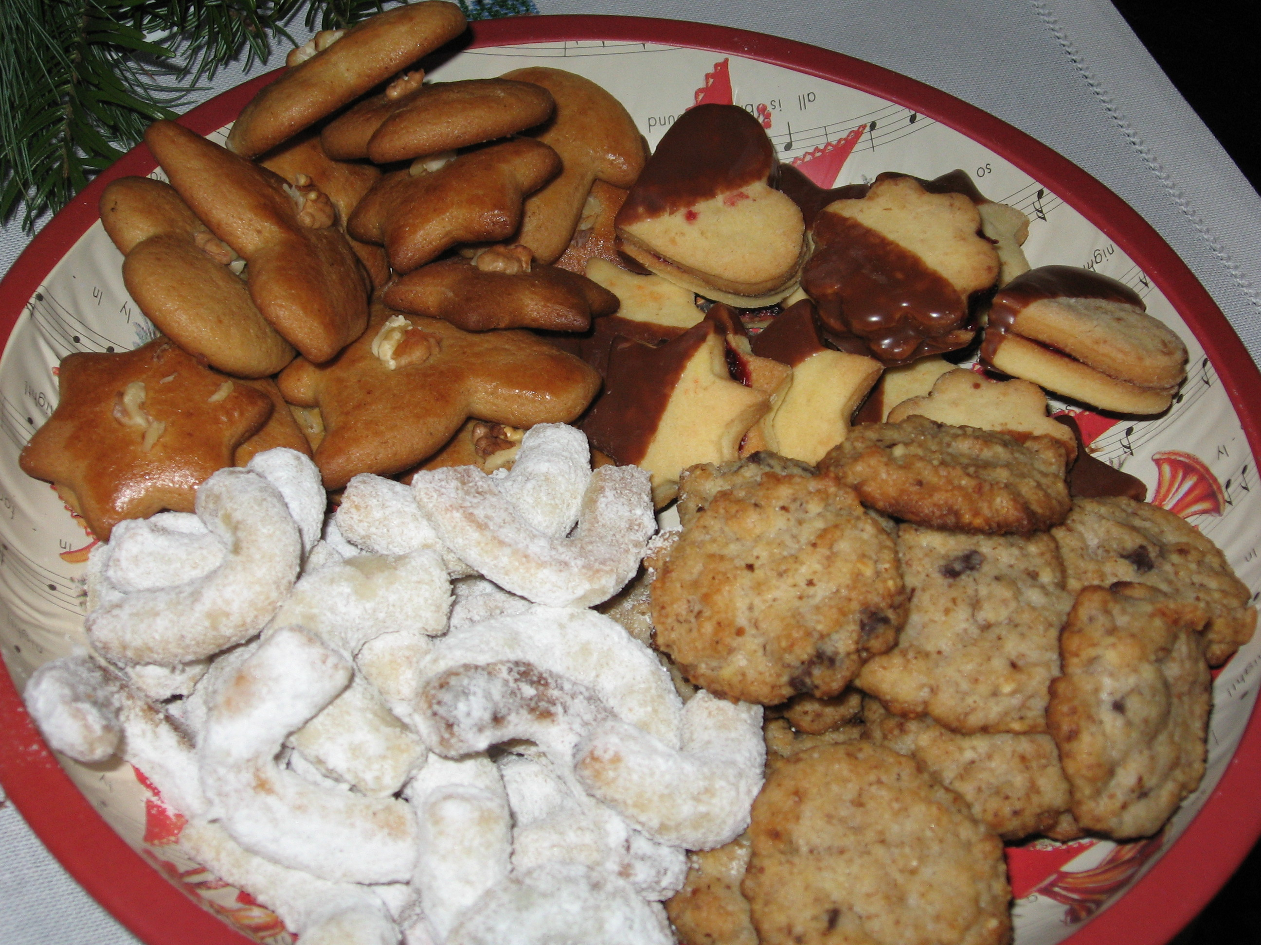 Vianočné pečivo - orechové cookies, medovníčky, linecké pečivo, vanilkové rožteky